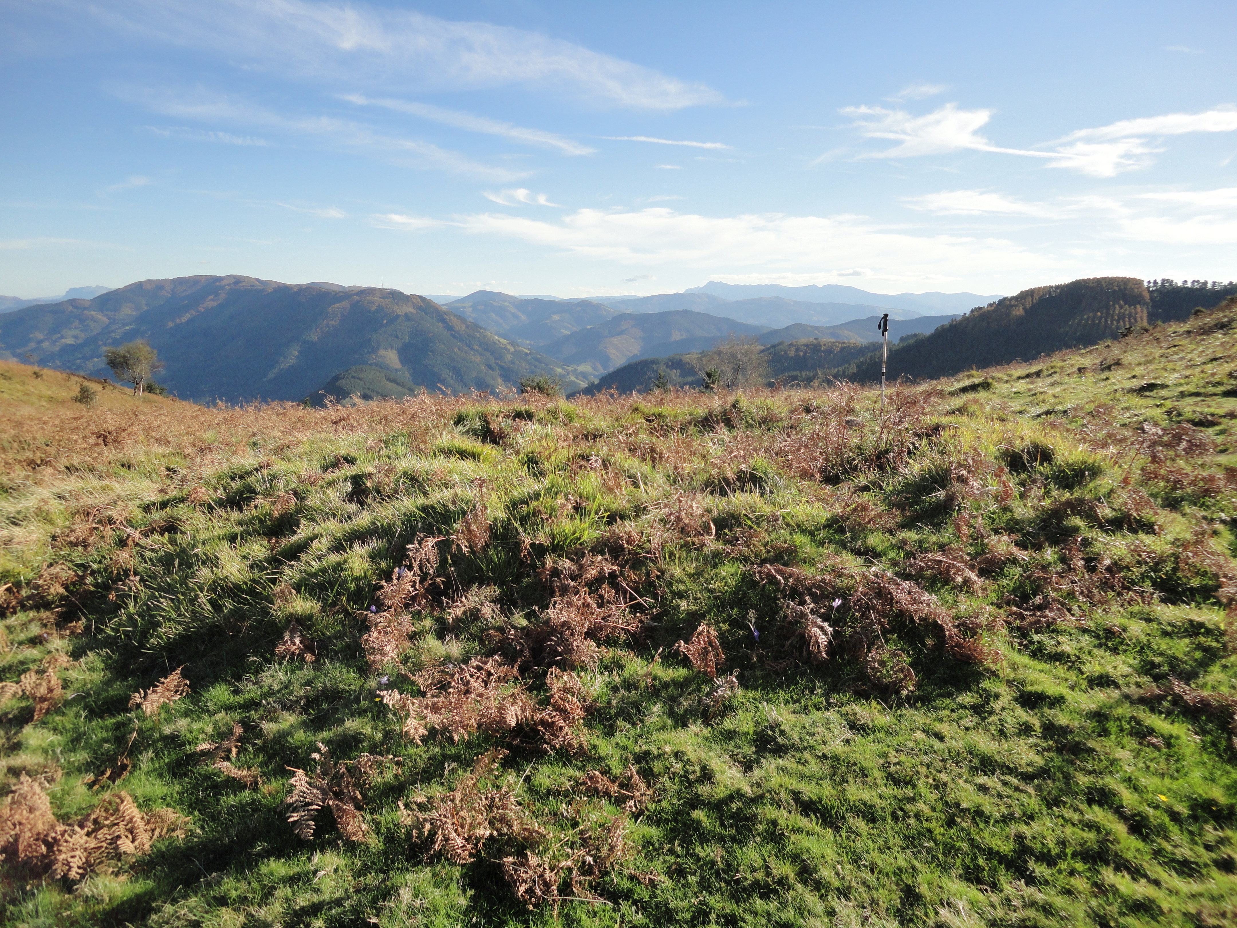 Olaburu trikuharria